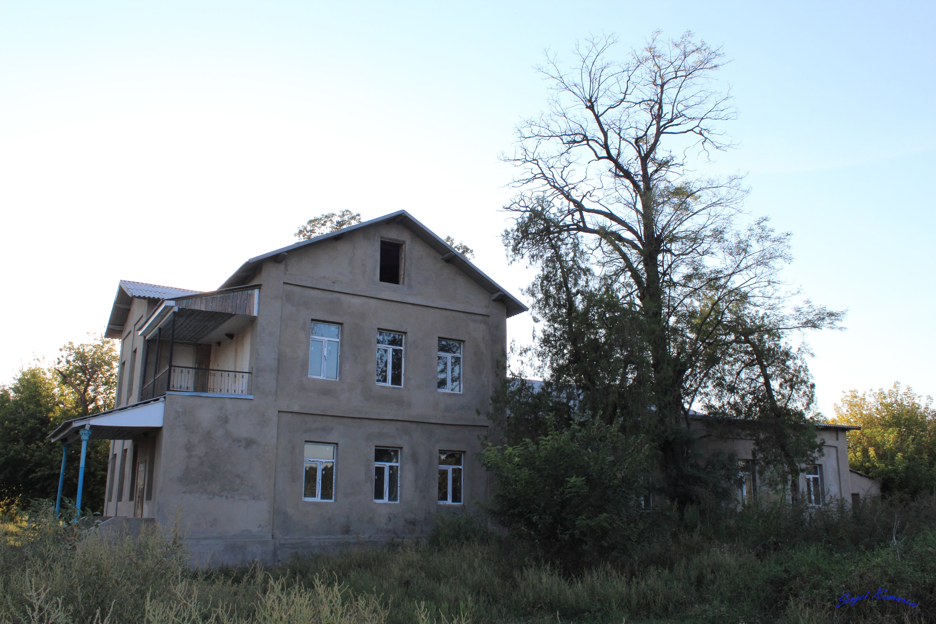 Со слов местных жителей после ремонта будет использоваться школой-интернатом